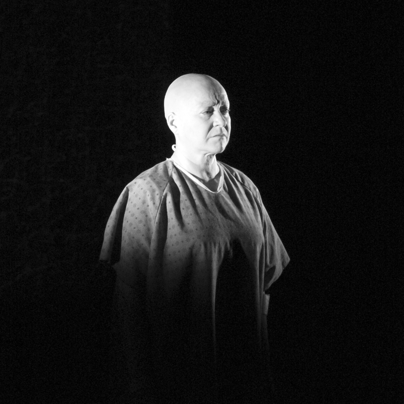 Lorraine Côté dans W.T au théâtre de la Bordée en 2015